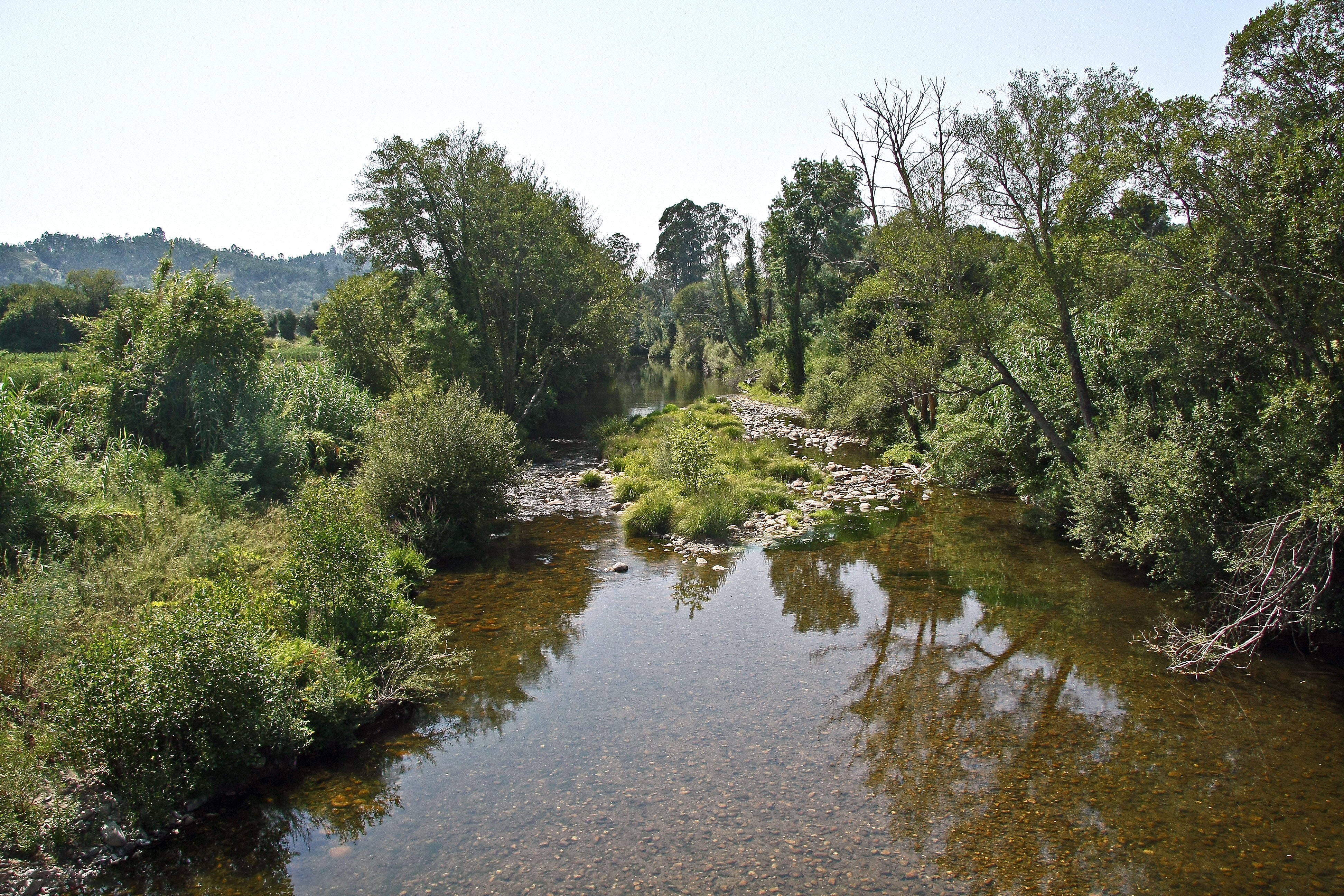 Rio Ceira - Portugal